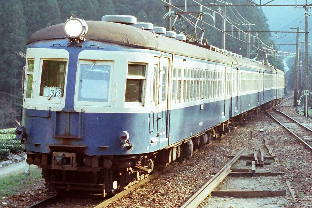 JNR EMU Kumoha 52, Iida line, Nagano prefecture, Japan. 国鉄飯田線を走行するクモハ52002他４連